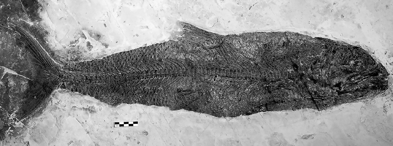 Fossil of Cavinichthys pachylepis